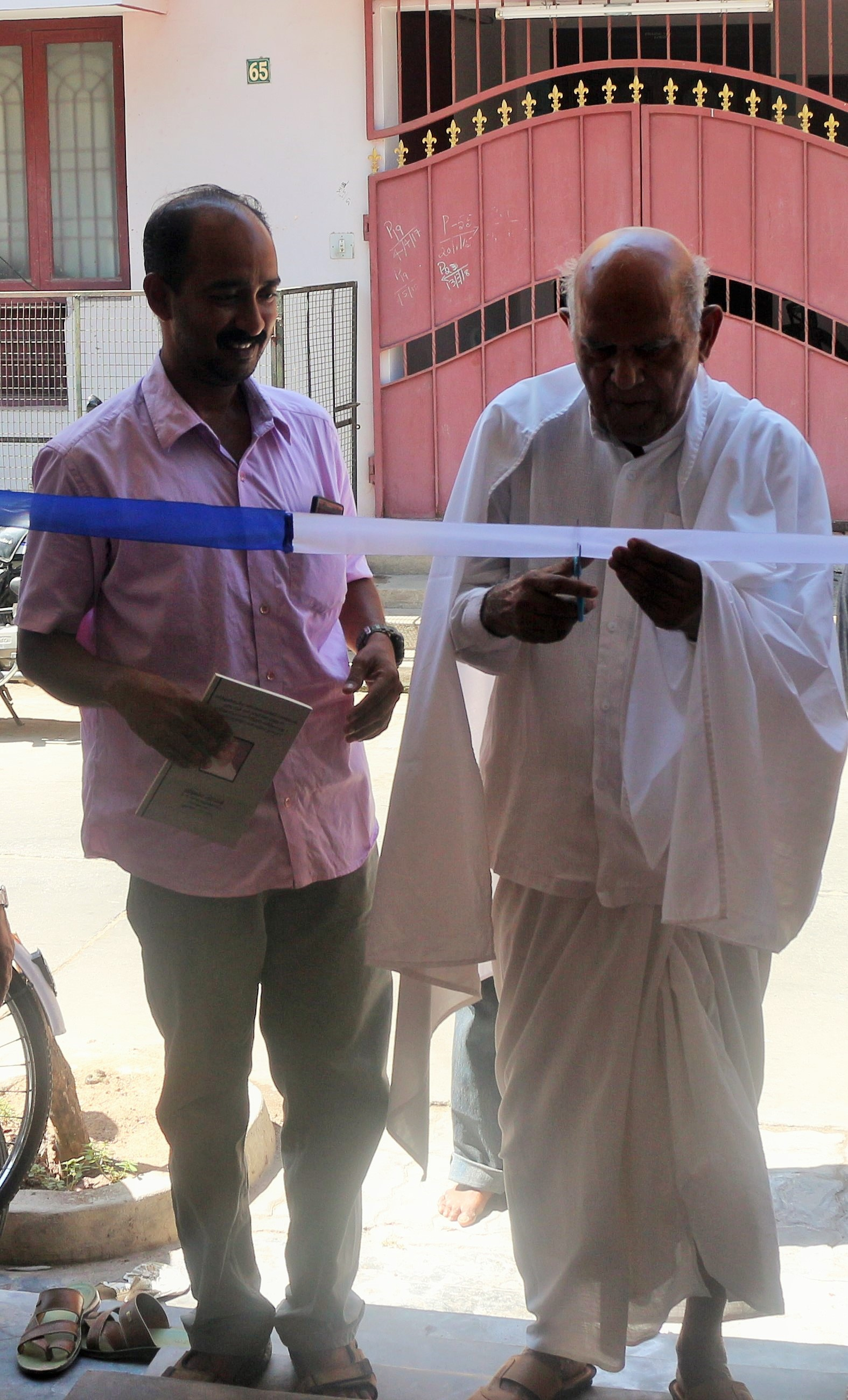 நீதியரசர் தாவீதன்னுசாமி அவர்கள் புதுவை அருங்காட்சியகத்தினை திறந்து வைக்கின்றார்.